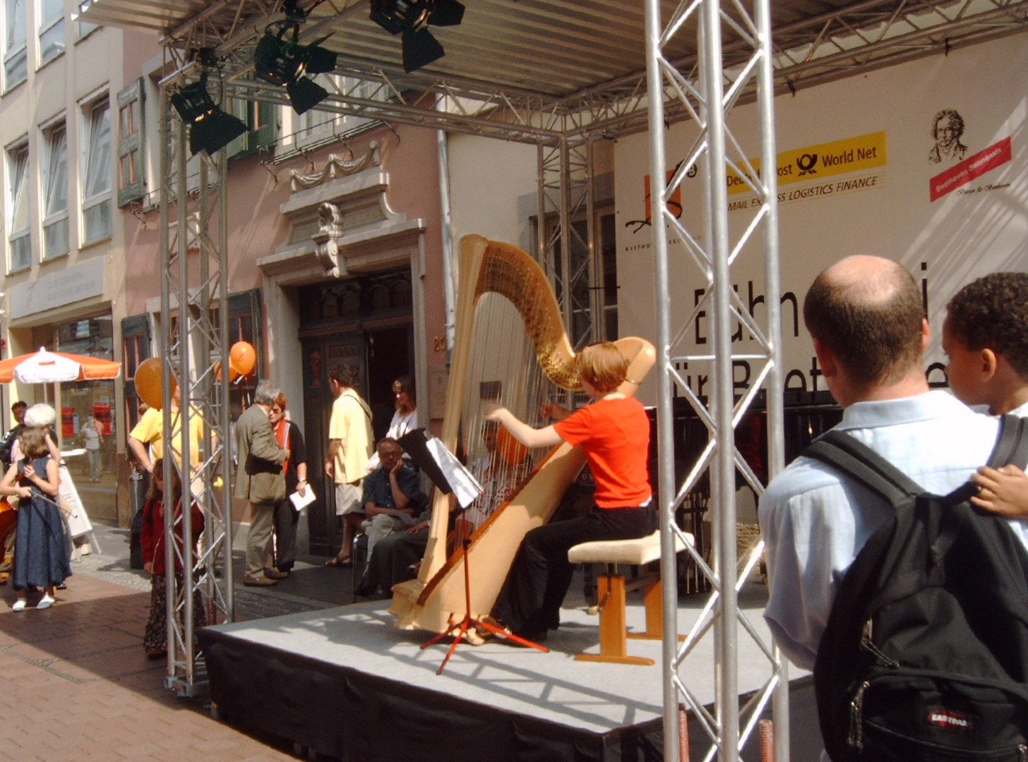 Konzert vor dem Beethovenhaus im Rahmen des Eröffnungsfestes des Beethovenfestes in Bonn